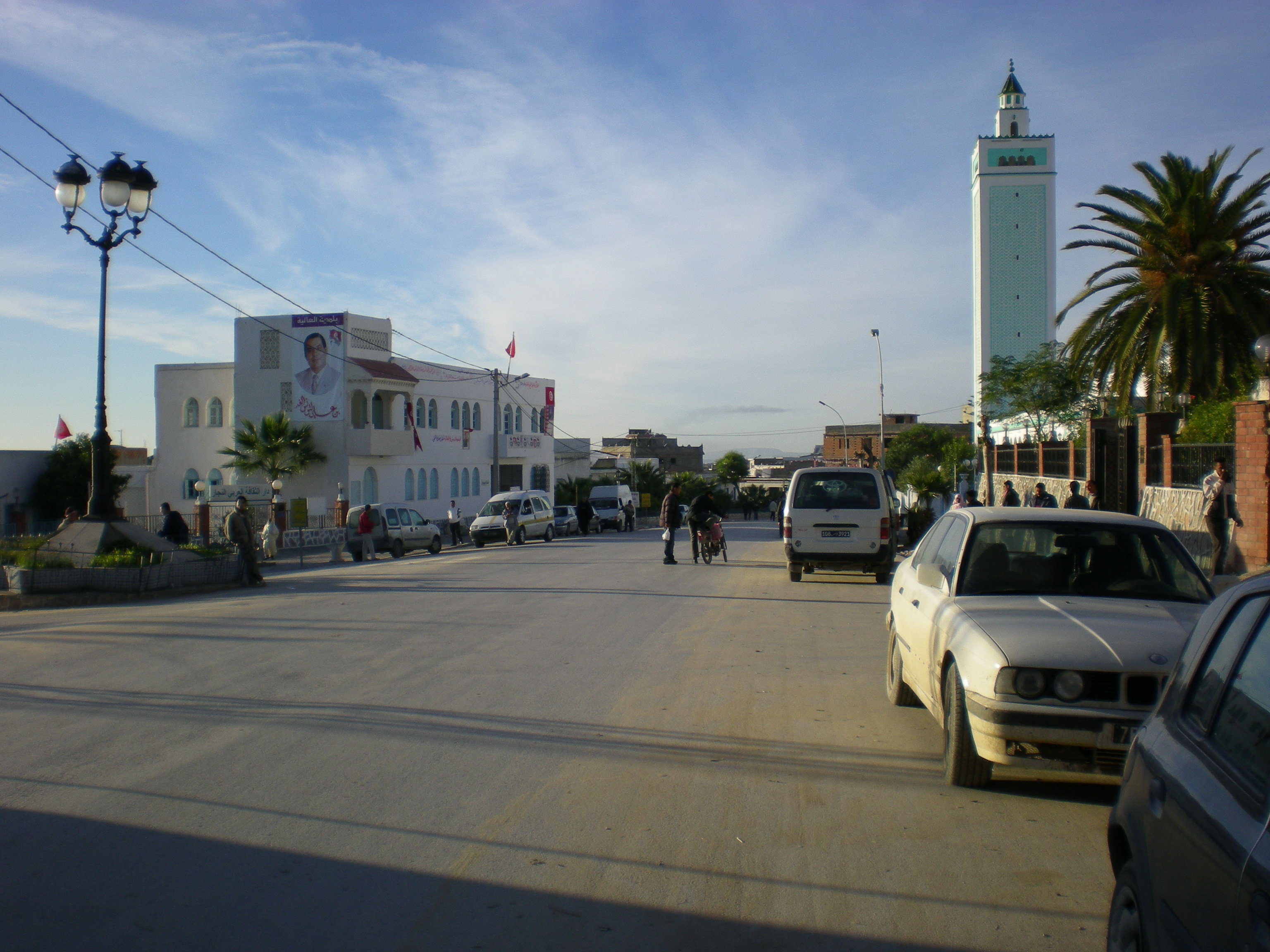 avenue principale à El Alia, Tunisie